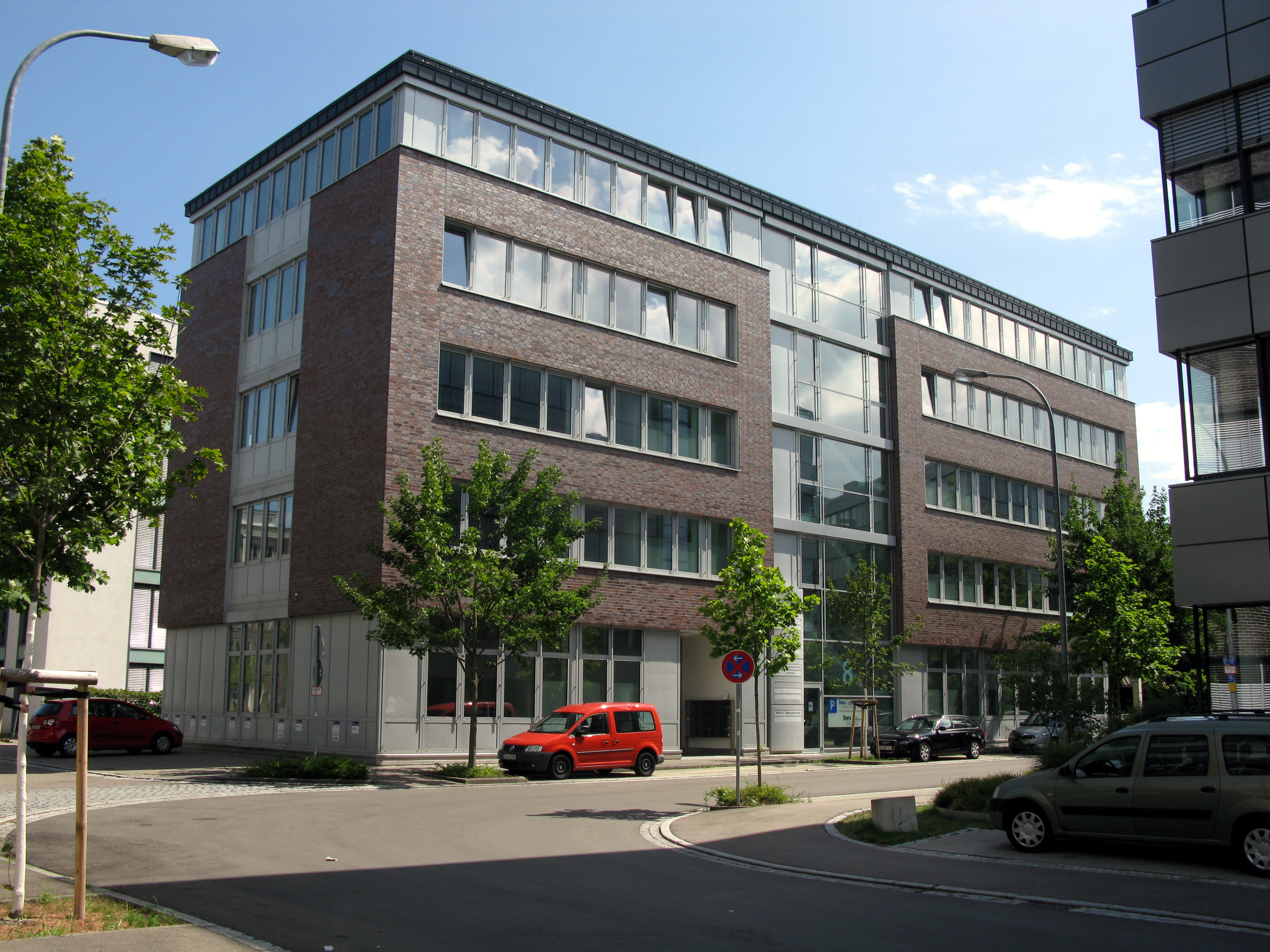 Konrad-Goldmann-Straße 8 in der Unterwiehre in Freiburg